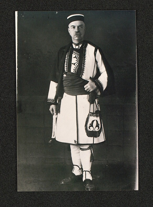 Милан Матов